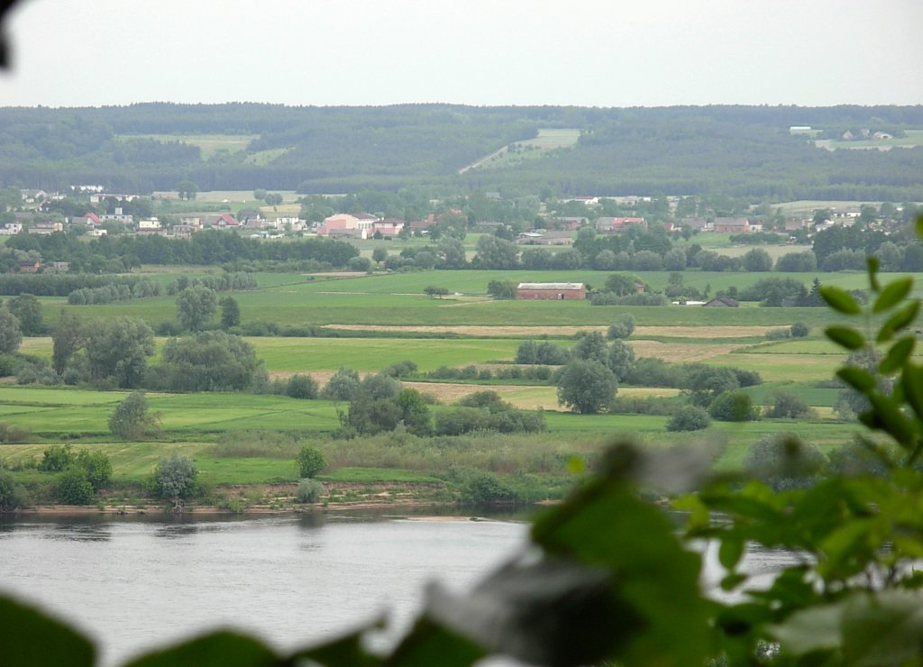 Widok ze zbocza w Kozielcu na dolinę Wisły (Basen Unisławski). Widoczna miejscowość Czarże